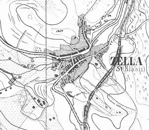 Urmesstischblatt zur Ortslage Zella St.Blasii bei Suhl